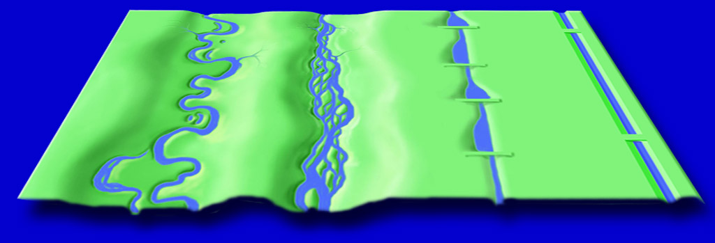 Les méandres sont peu à peu rectifiés et les fleuves barrés les méandres et les bras-morts tendent à rapidement régresser puis disparaitre au profit de la rectification des canaux, depuis plus de 500 ans en Europe, avec diverses conséquences négatives : accélération des flux d'eau, impliquant ; inondations plus graves et plus fréquentes en aval sécheresses accrues en amont. aggravation de l'érosion, localement perturbations écologique, avec fragmentation écopaysagère et dégradation de l'eau liée à l'artificialisation des berges, et souvent aux écluses et barrages associés à ces aménagements moindre alimentation de la nappe phréatique, car la surface et souvent le volume total d'eau du cours des fleuves diminuent, alors que toutes choses égales par ailleurs, c'est la hauteur d'eau qui contrôle la vitesse de percolation (Loi de Darcy).